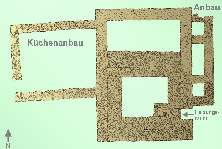 Grabungsskizze vom Steingebäude als Herrensitz Düna